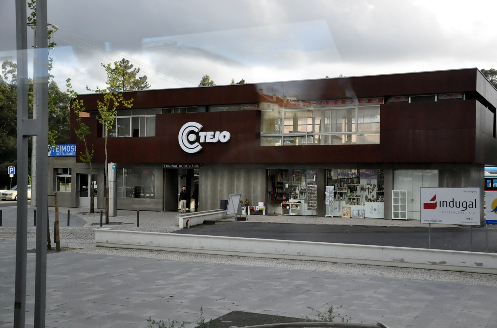 Fatima 0746